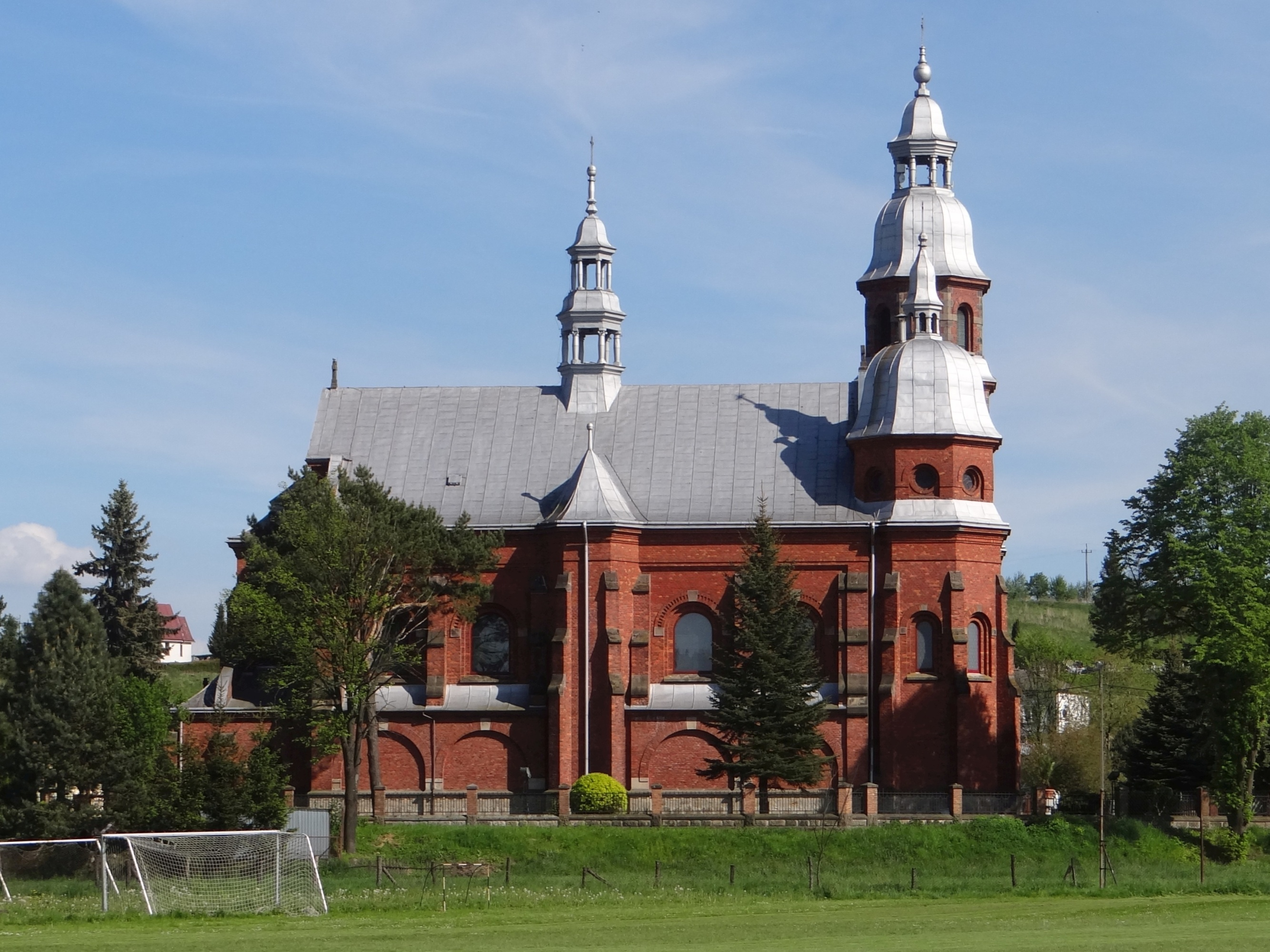 Ołpiny kościół